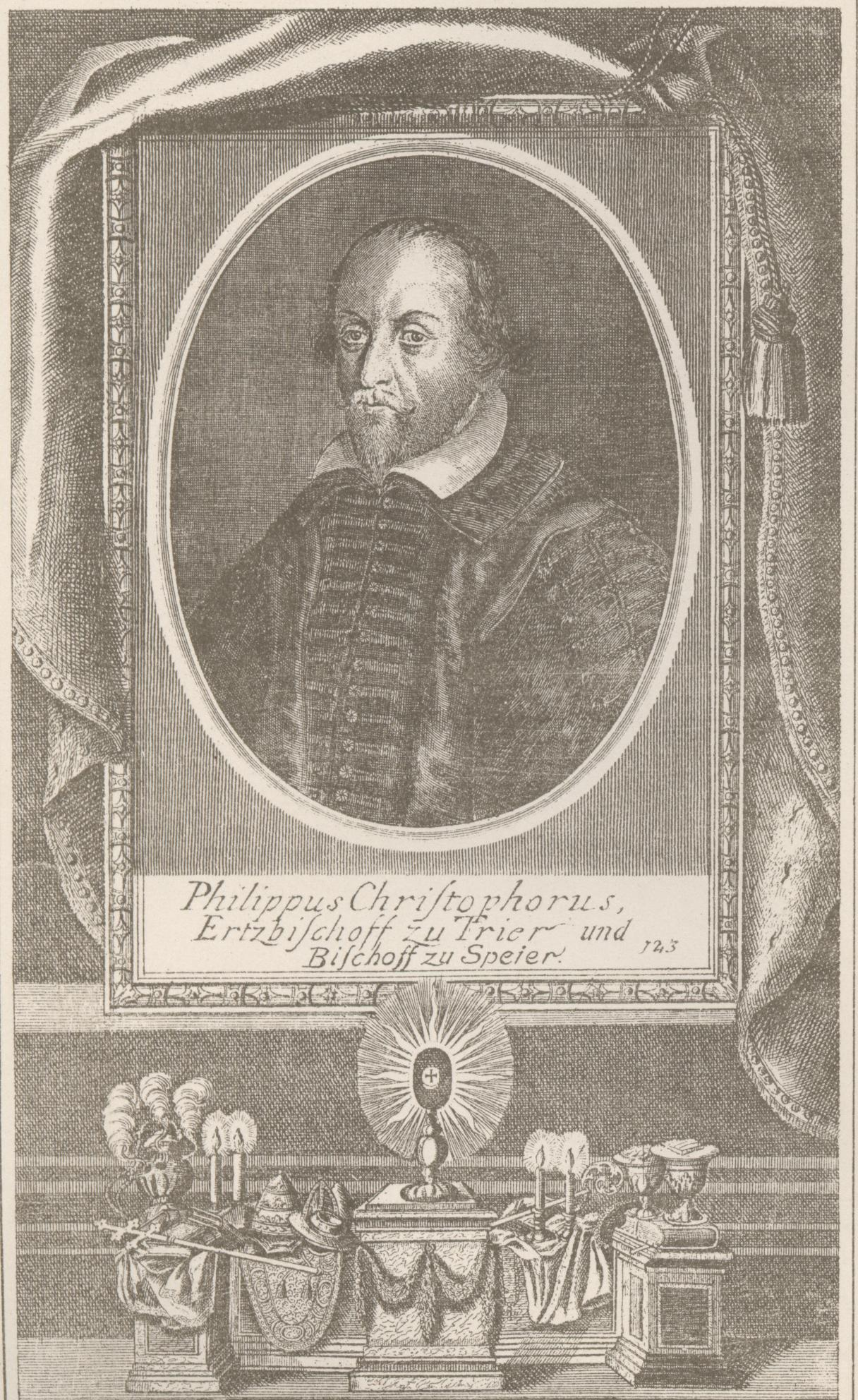 Bischof Christoph Philipp von Sötern, Trier und Speyer